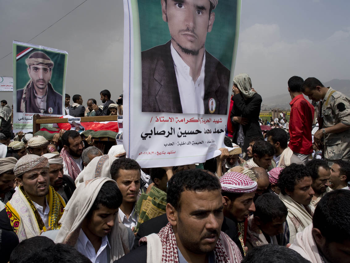 Posters